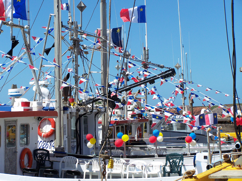 Bateaux décorés aux couleurs de l'Acadie dans la marina de Bassin (Anse-à-la-Cabane), aux Îles-de-la-Madeleine.